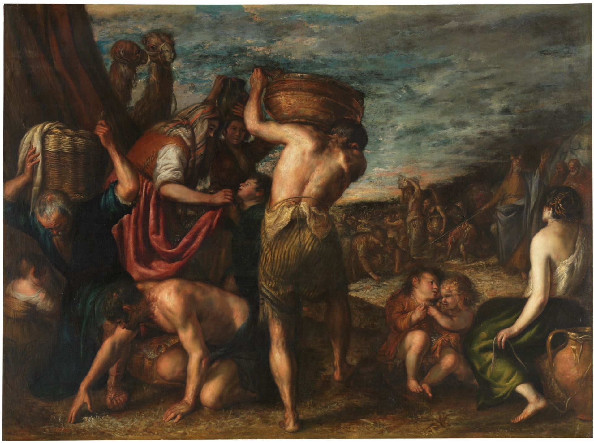 La obra representa a los israelitas recogiendo el maná durante su estancia en el desierto después de haber salido de Egipto.